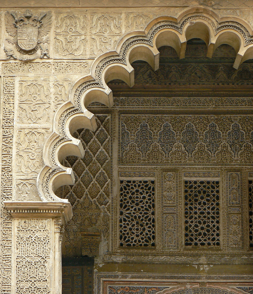 Palacio de Pedro I. Alcázar de Sevilla. (España)